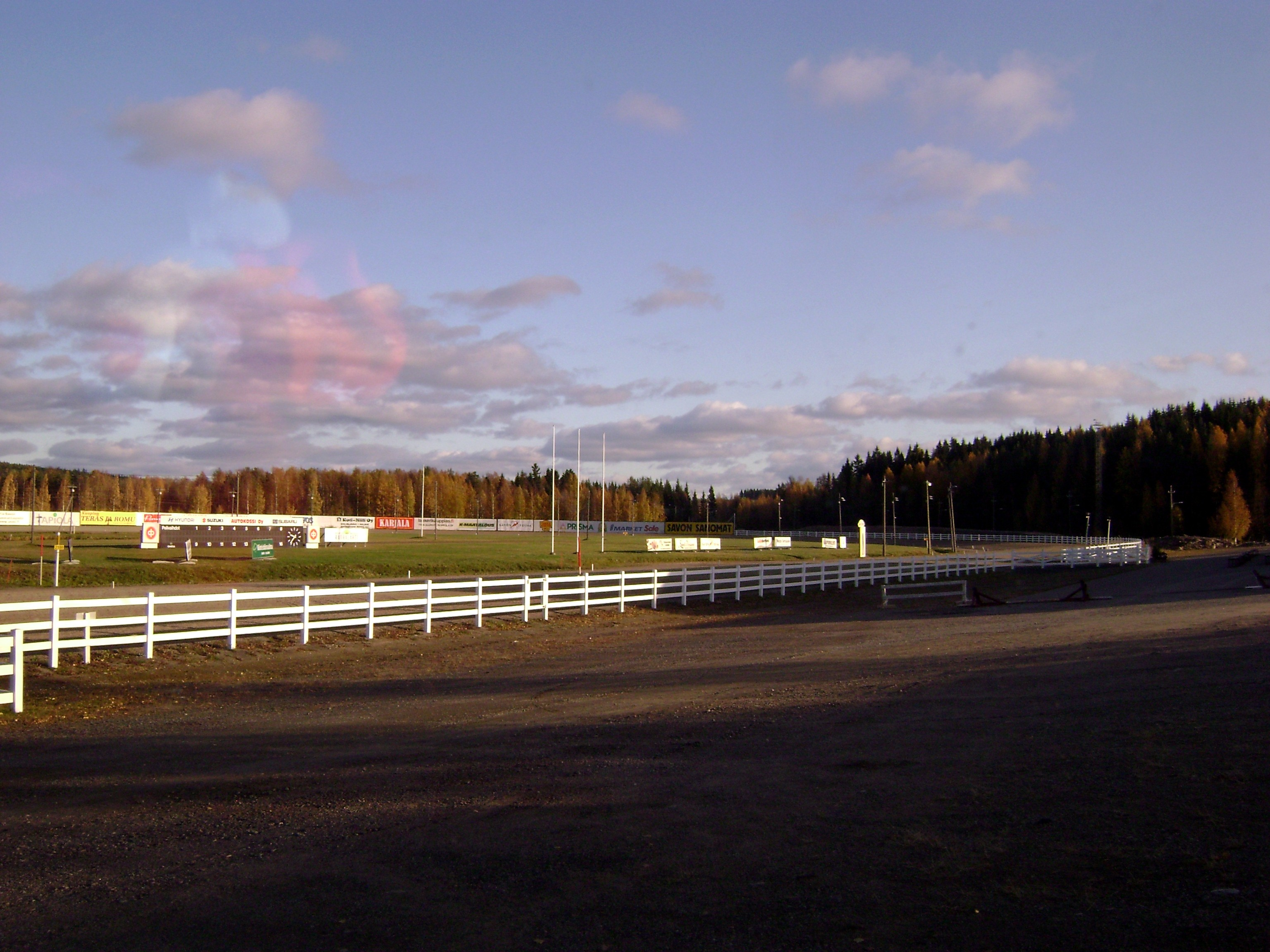 Kuopion ravirata Sorsasalon kaupunginosassa.